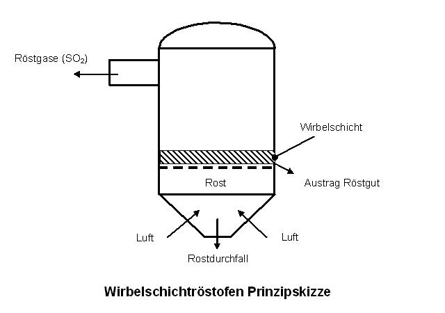 Skizze Wirbelschichtröstofen